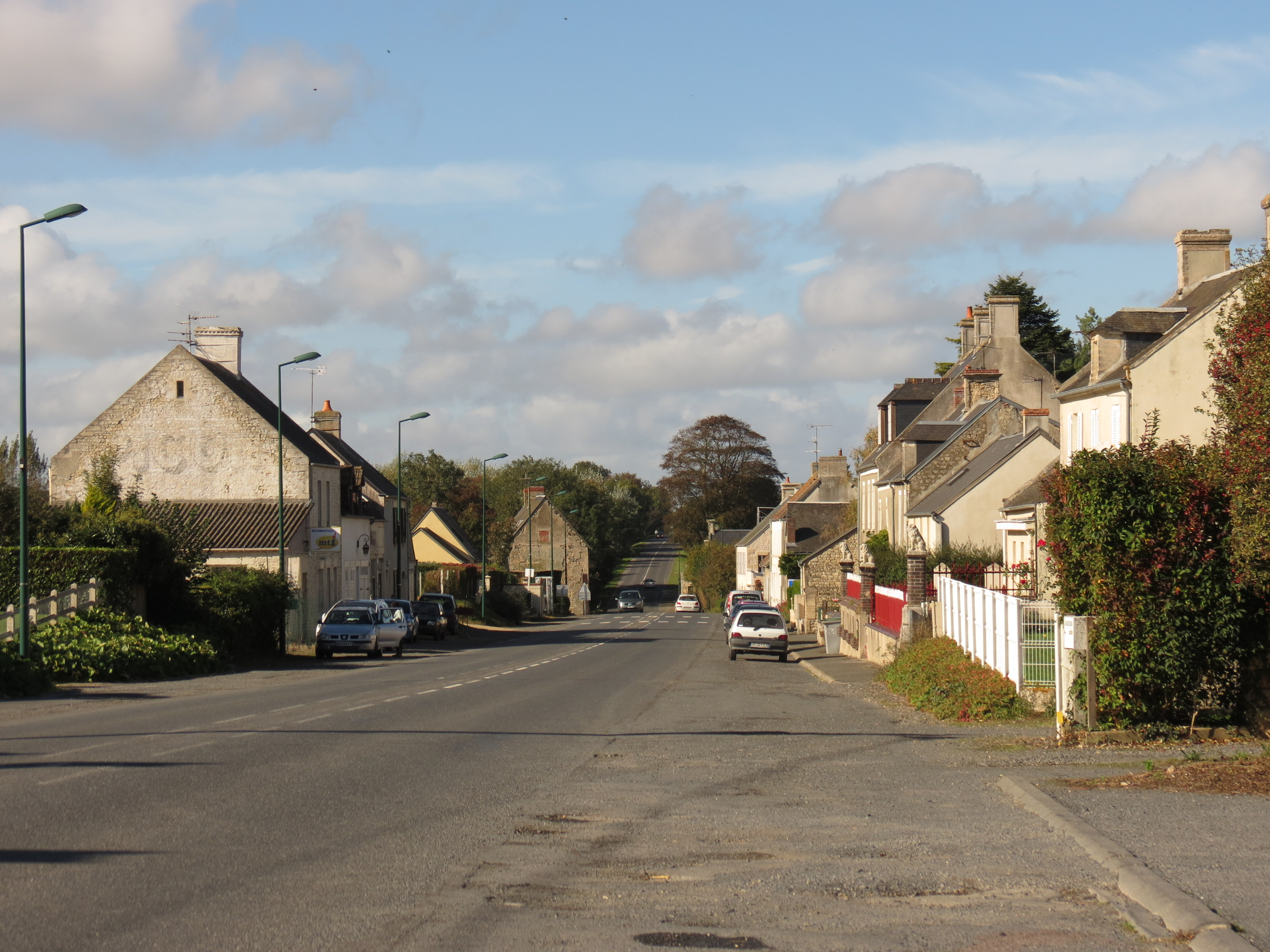 Rue principale à Mosles, ancienne N13